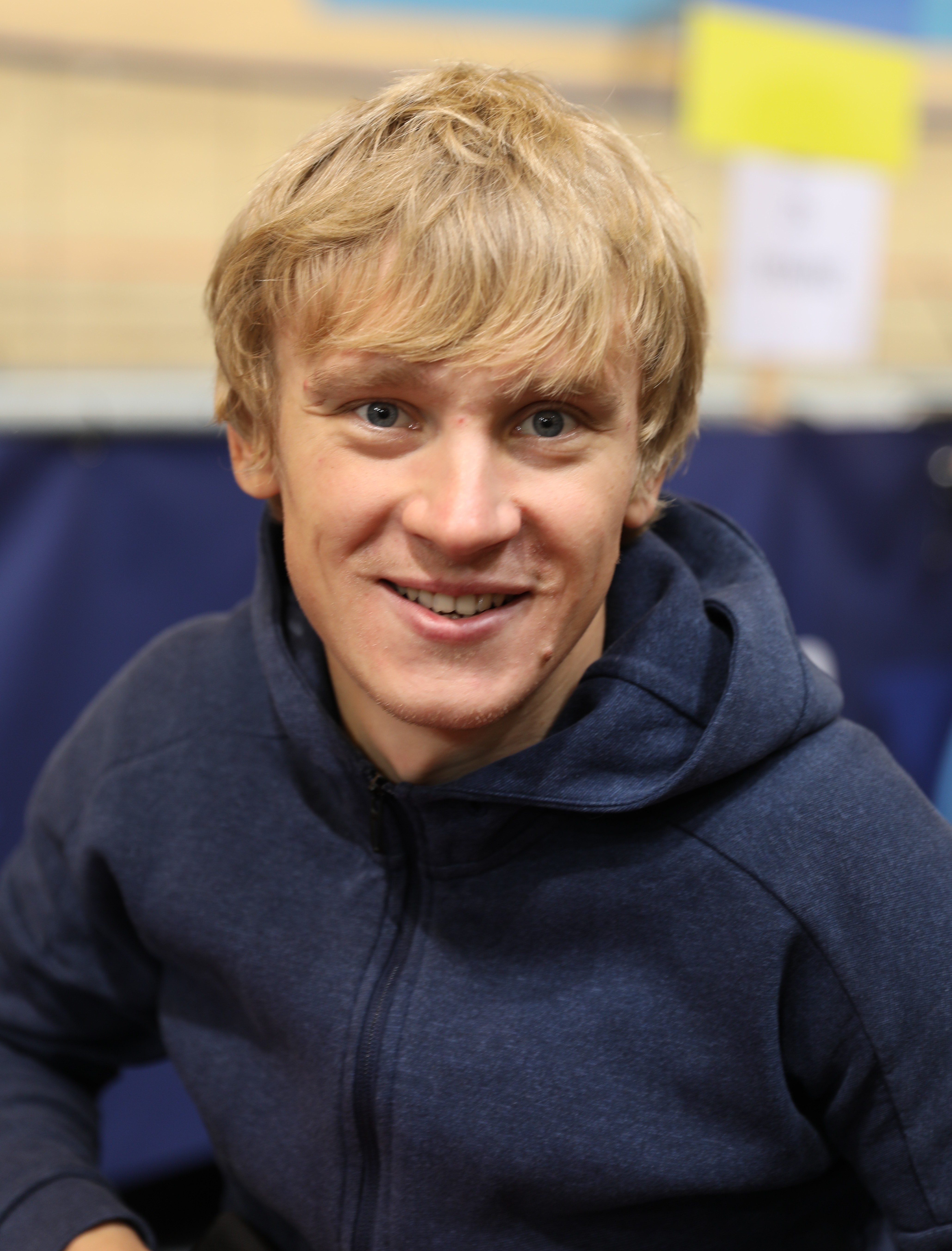 Volodymyr Dzhus, ukrainischer Radsportler